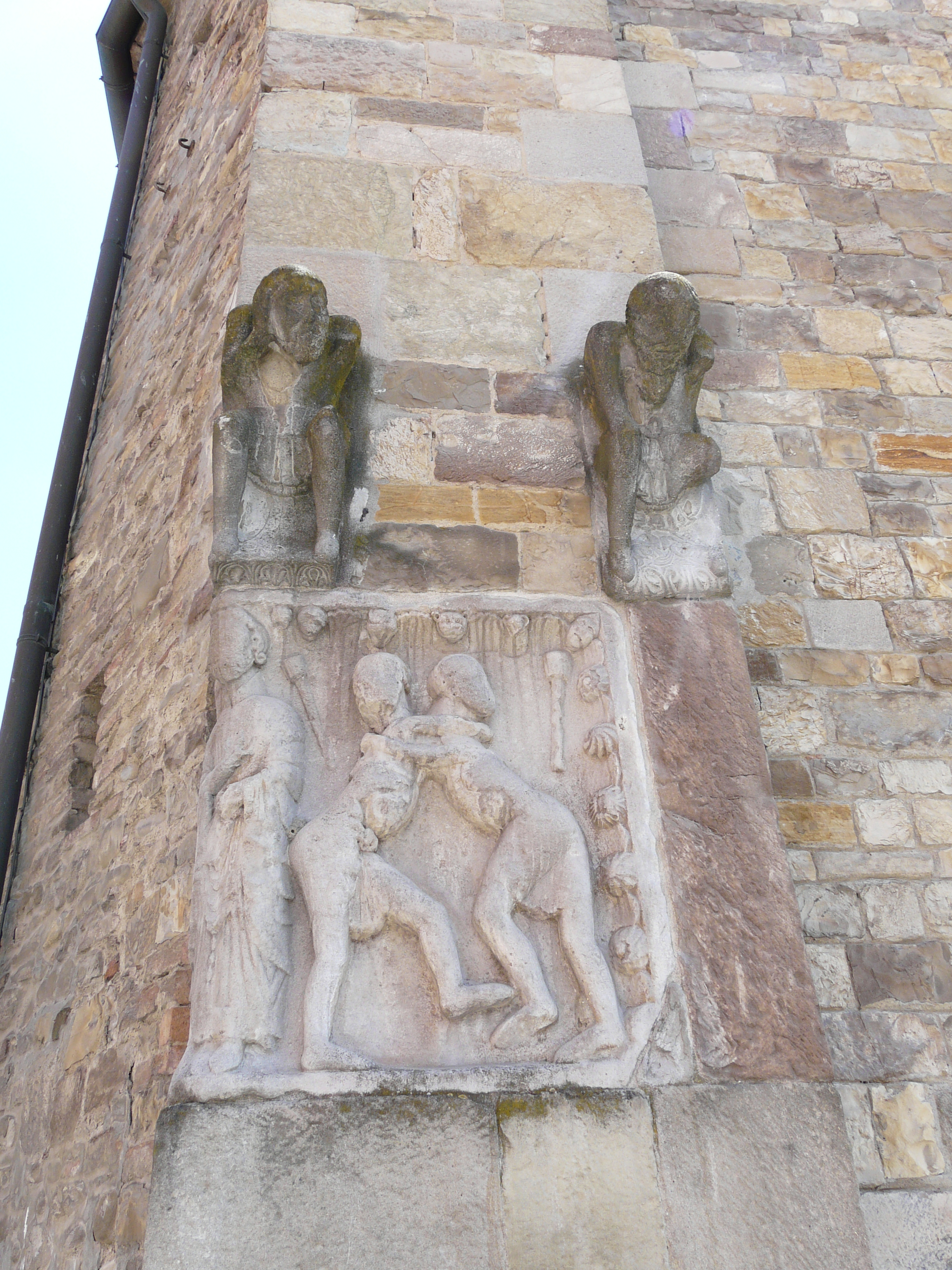 Chiesa dell'Assunzione di Maria Vergine, Fornovo di Taro, Emilia-Romagna, Italia